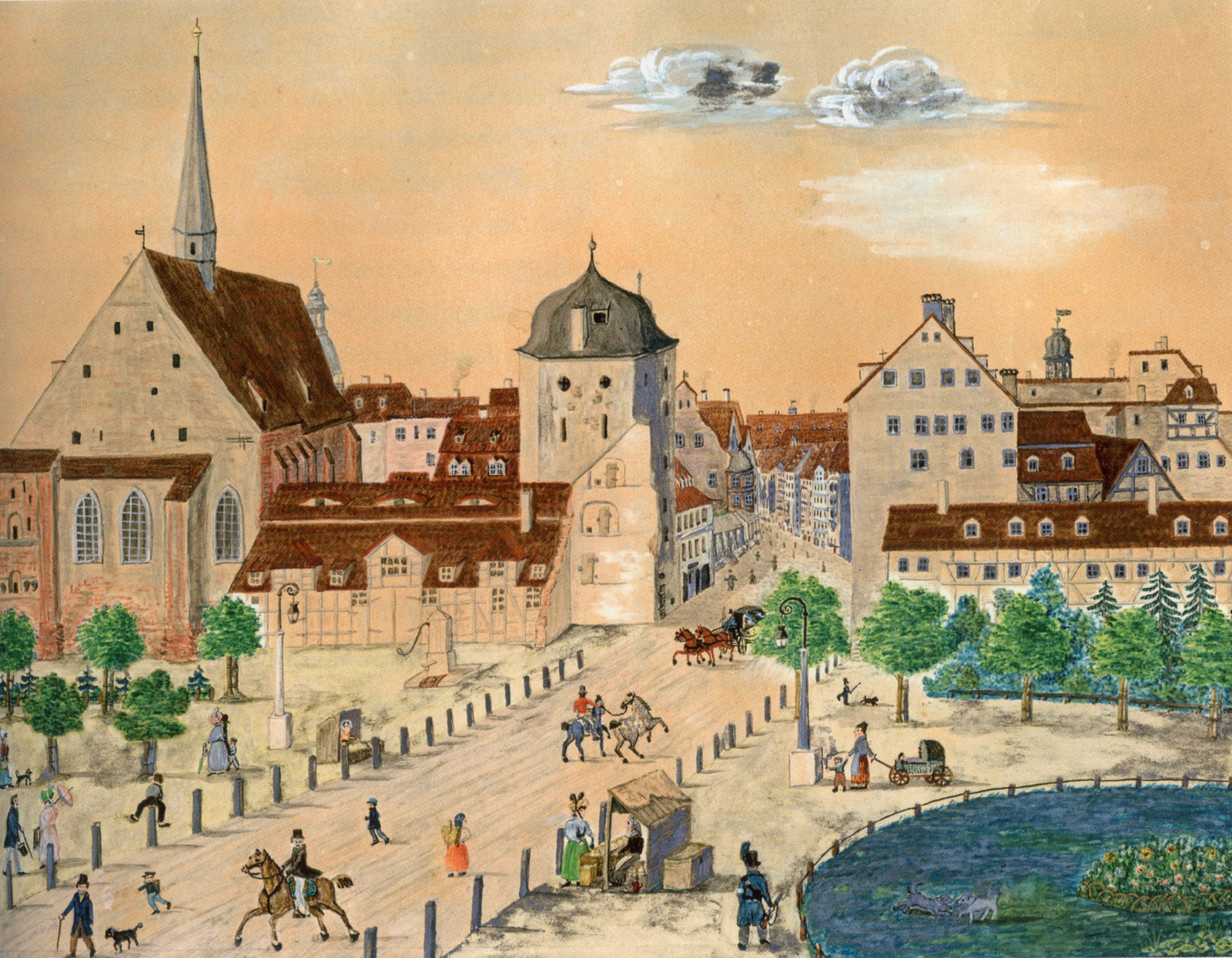 Bauplatz für Felsches Café français 1831 in Leipzig. Noch stehen Schuldturm und Kleinbauten, das Grimmaische Tor ist abgerissen.